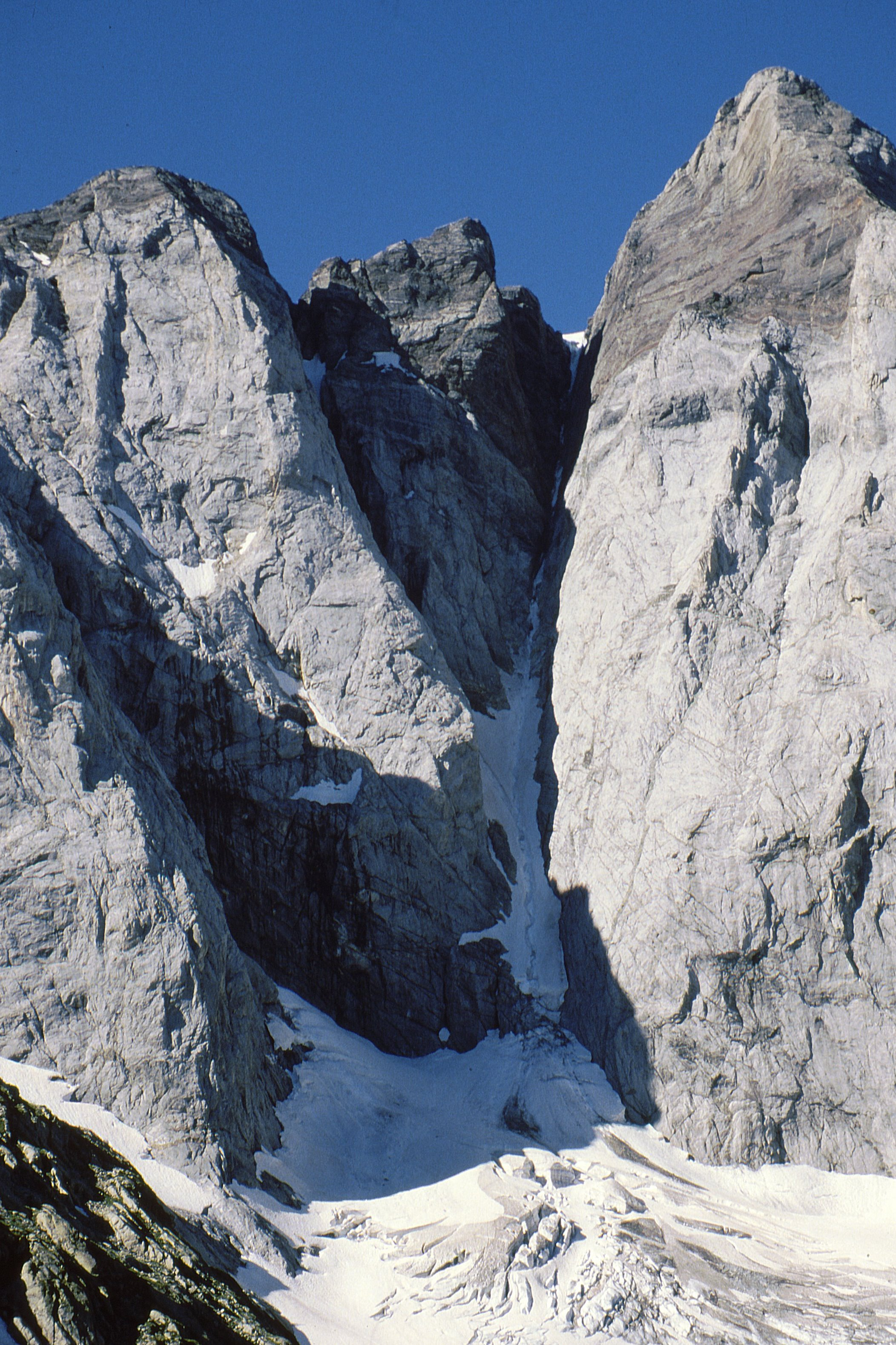 Pointe de Chausenque, Piton Carré, couloir de Gaube et Pique Longue du Vignemale (au dessus du glacier des Oulettes de Gaube).